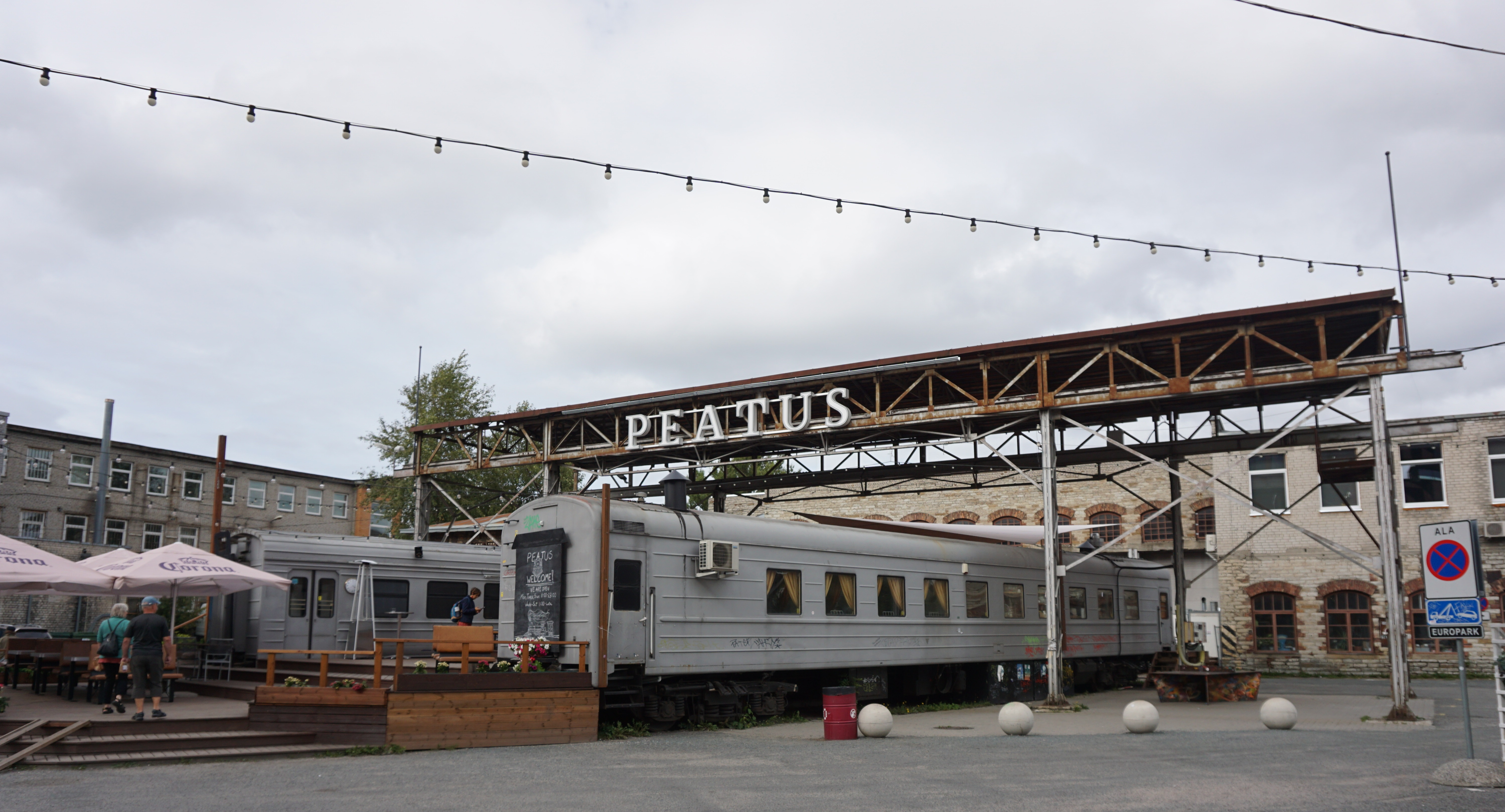 Endine Tallinna vagunidepoo (Telliskivi depoo)